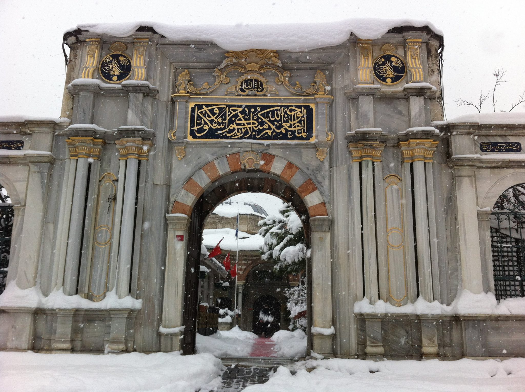 Mihrişah Valide Sultan İmareti Giriş Kapısı-Eyüpsultan